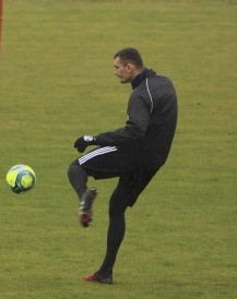 Entrainement RCS - Ludovic Ajorque